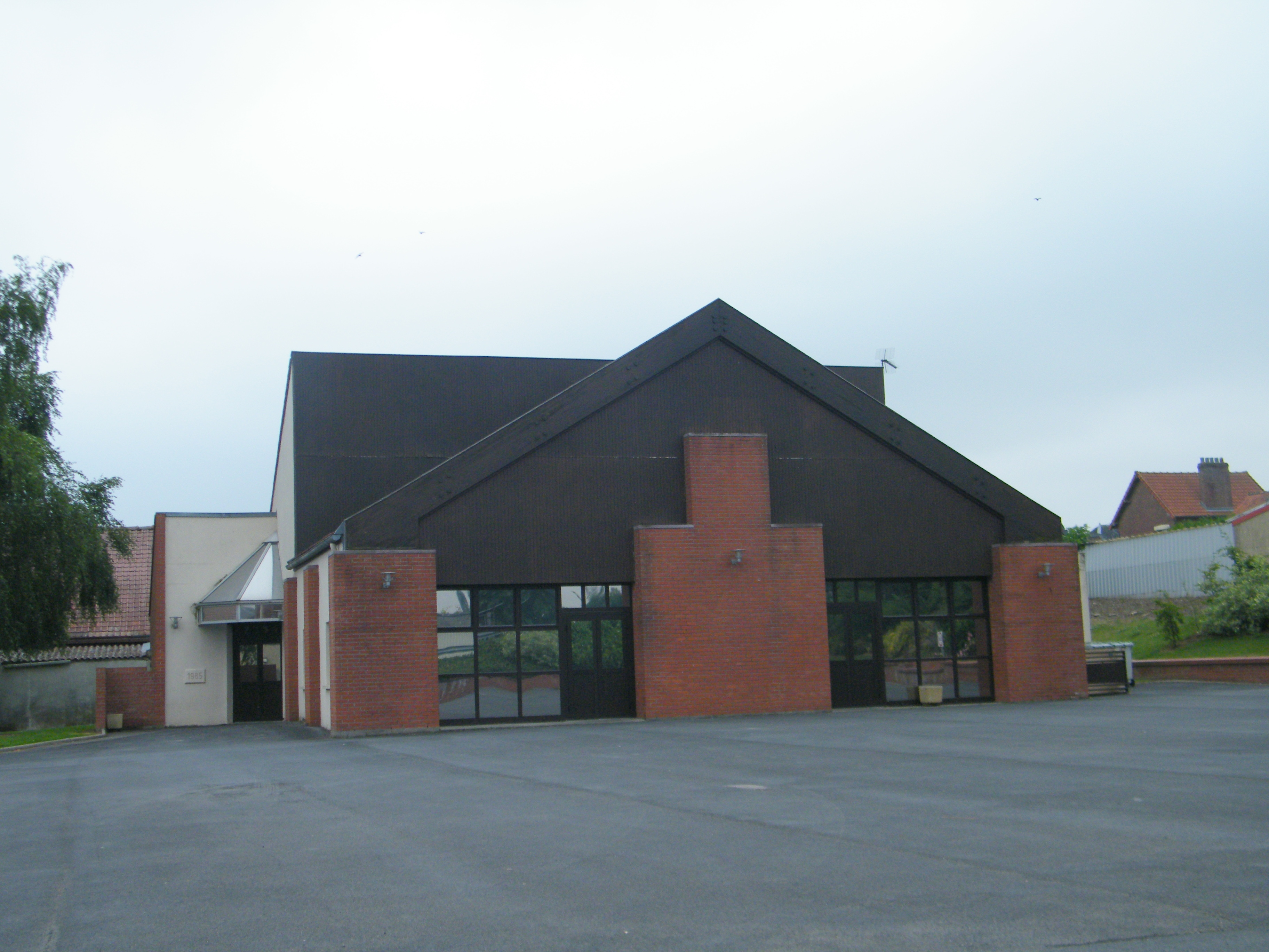 Salle.